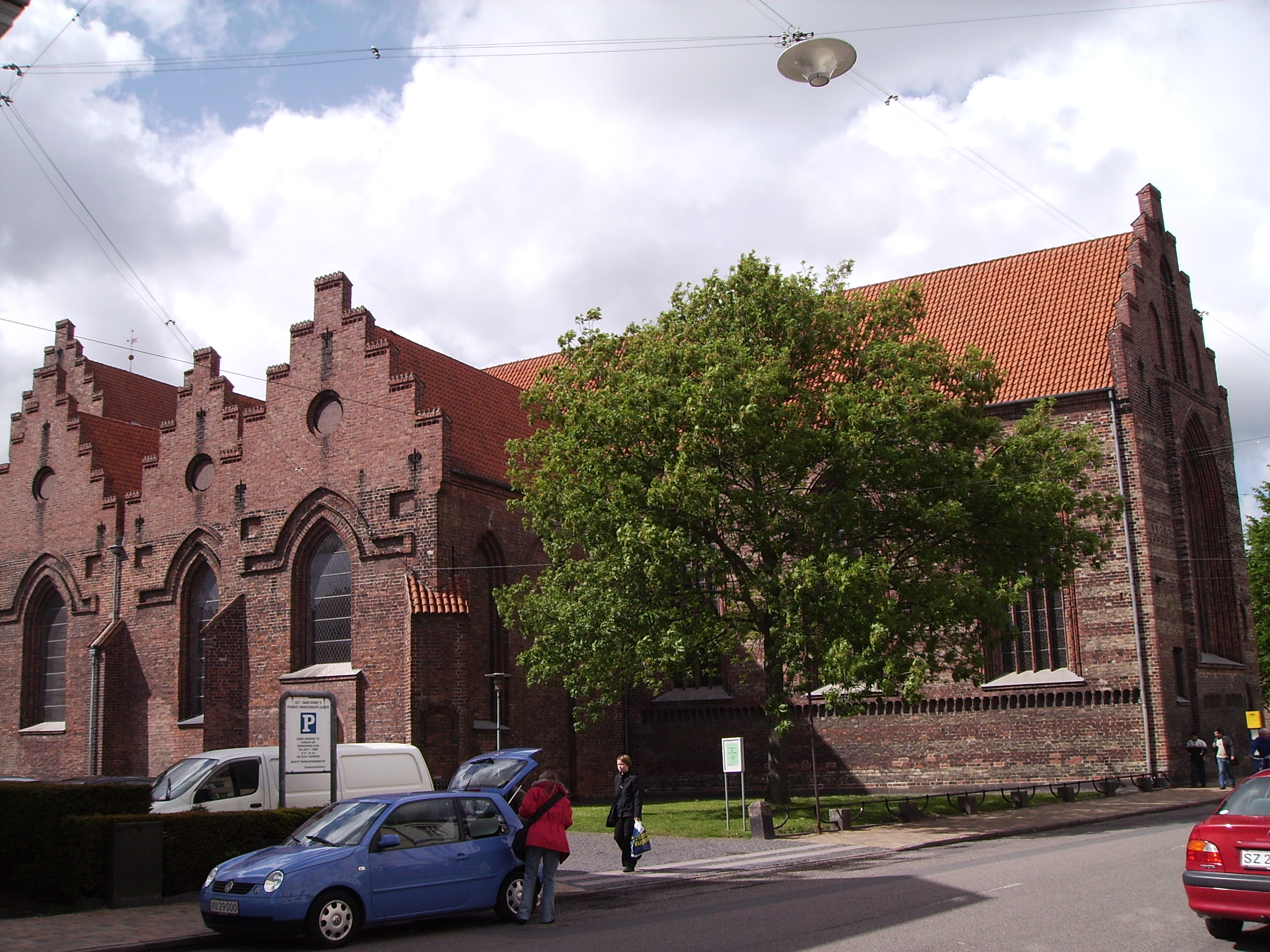 Sankt Hans Kirke, Sankt Hans Sogn, Odense Herred, Odense Amt, Denmark (Danish Church) Date: 29.05.2006 Photographed by Søren Møller